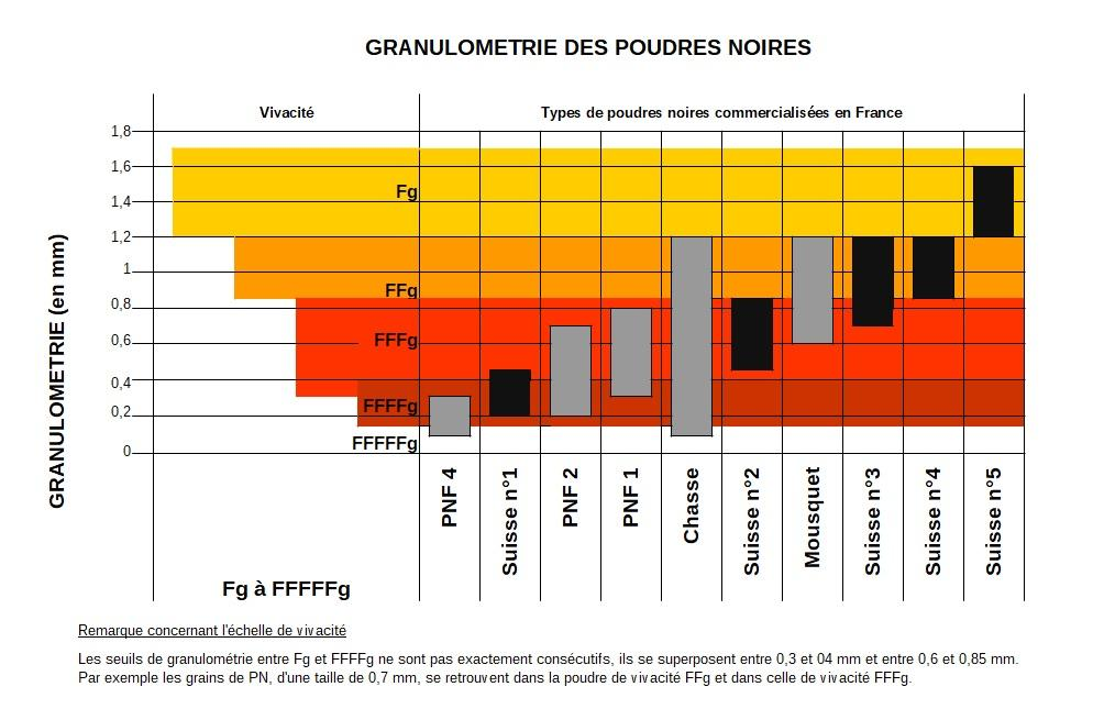 Ido: Tableau destiné aux tireurs soprtifs